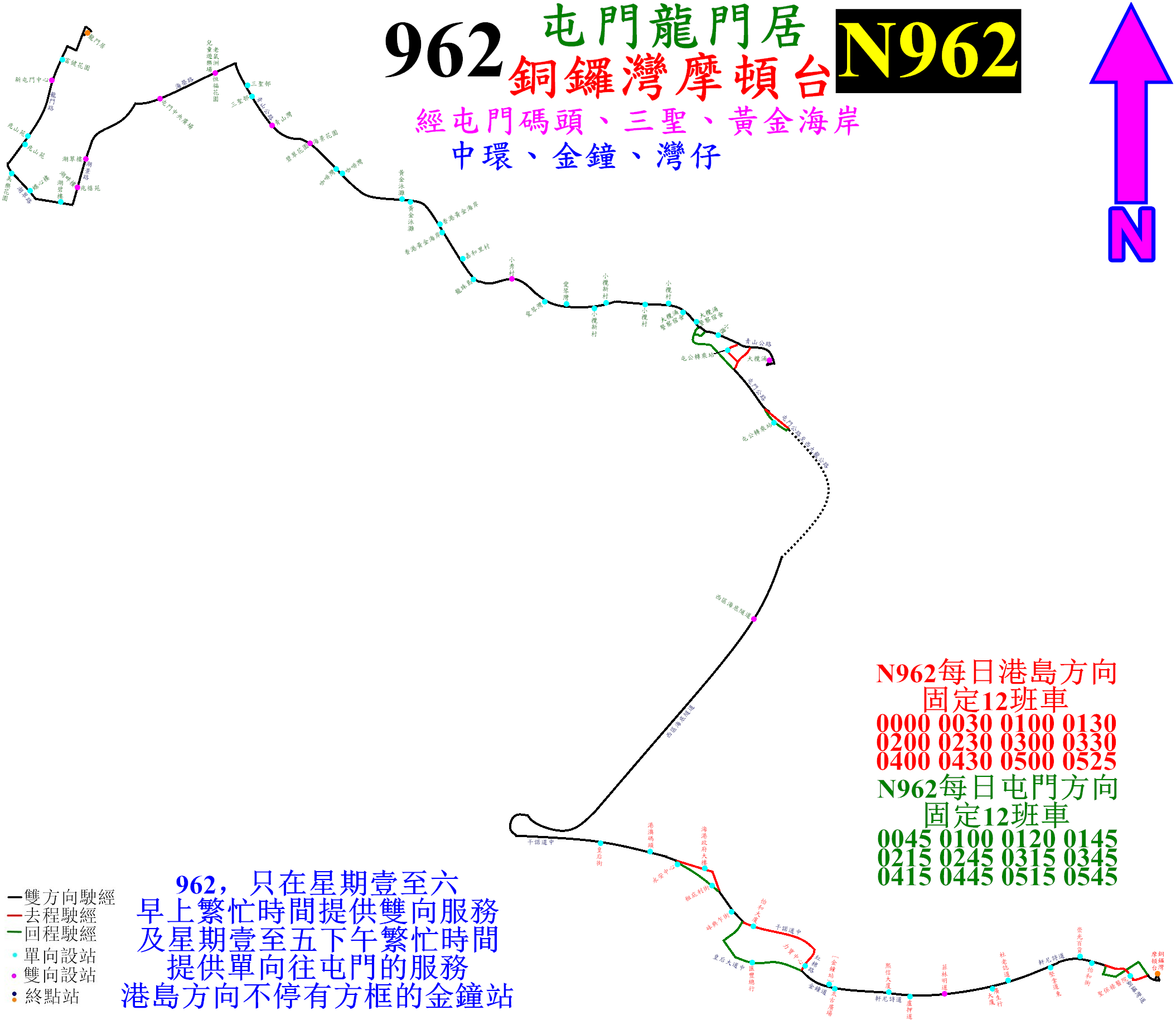 中文（香港）: 過海巴士962線及N962線的走線圖，兩者的分別之處就是N962港島方向停靠多1個站(金鐘站)，而962線則不停